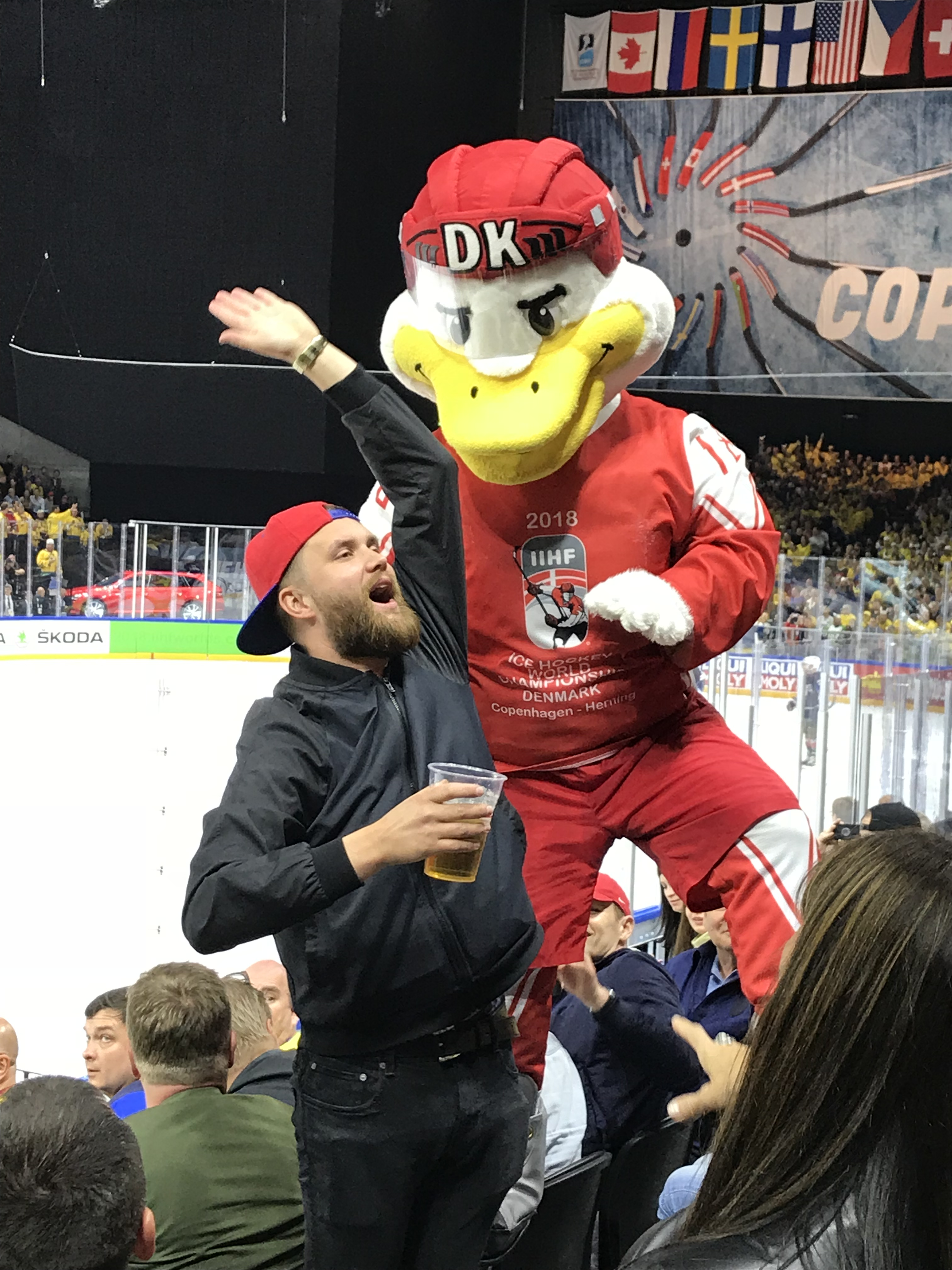 Games mascot at IIHF World Championship semifinal 2018